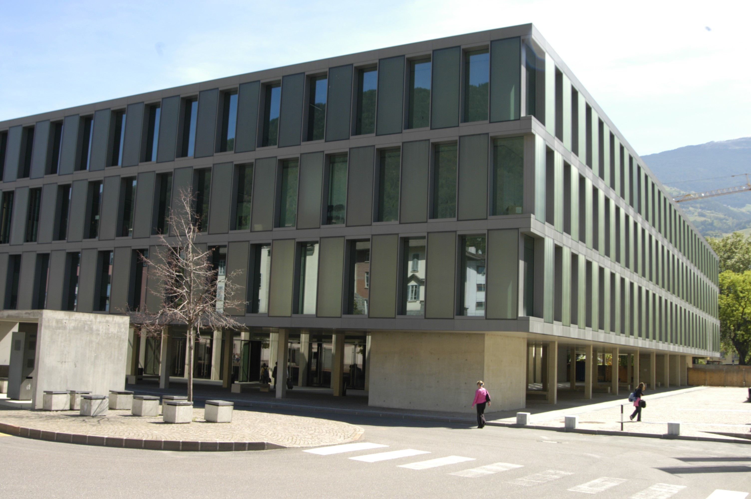 Außenansicht Universität Brixen